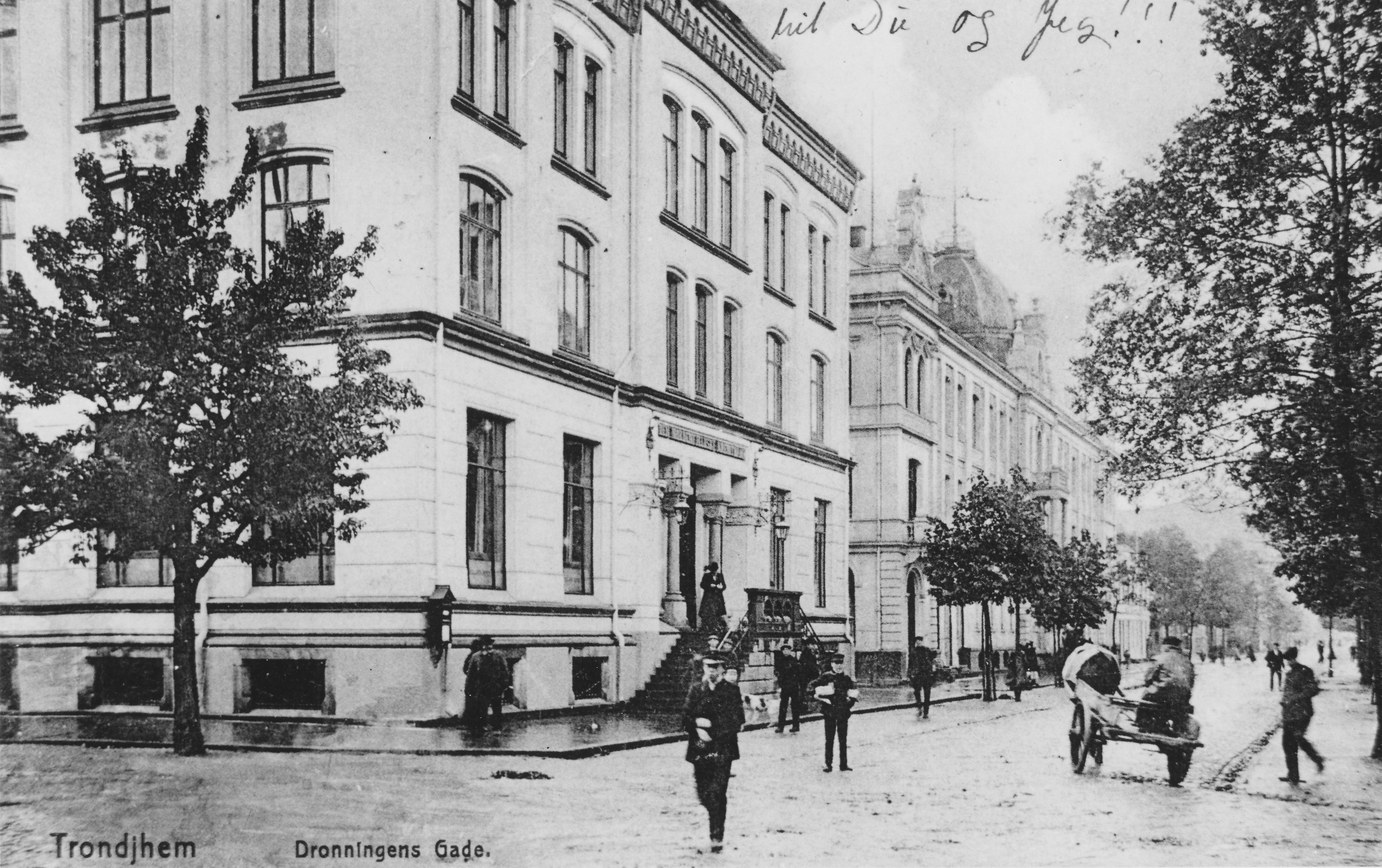 Dronningens gate 3 sett fra Søndre gate. I forgrunnen ser vi Nordenfjeldske Kreditbanks gård, som ble oppført i 1874, og ombygd i 1901. Den ble revet i 1970 for å gi plass for Fokus Banks nybygg. I bakgrunnen ligger Britannia Hotell. Fra postkort ca 1900. Ukjent fotograf.